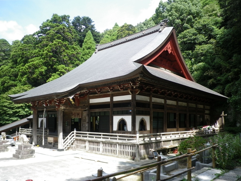 最福寺本堂(東金市)